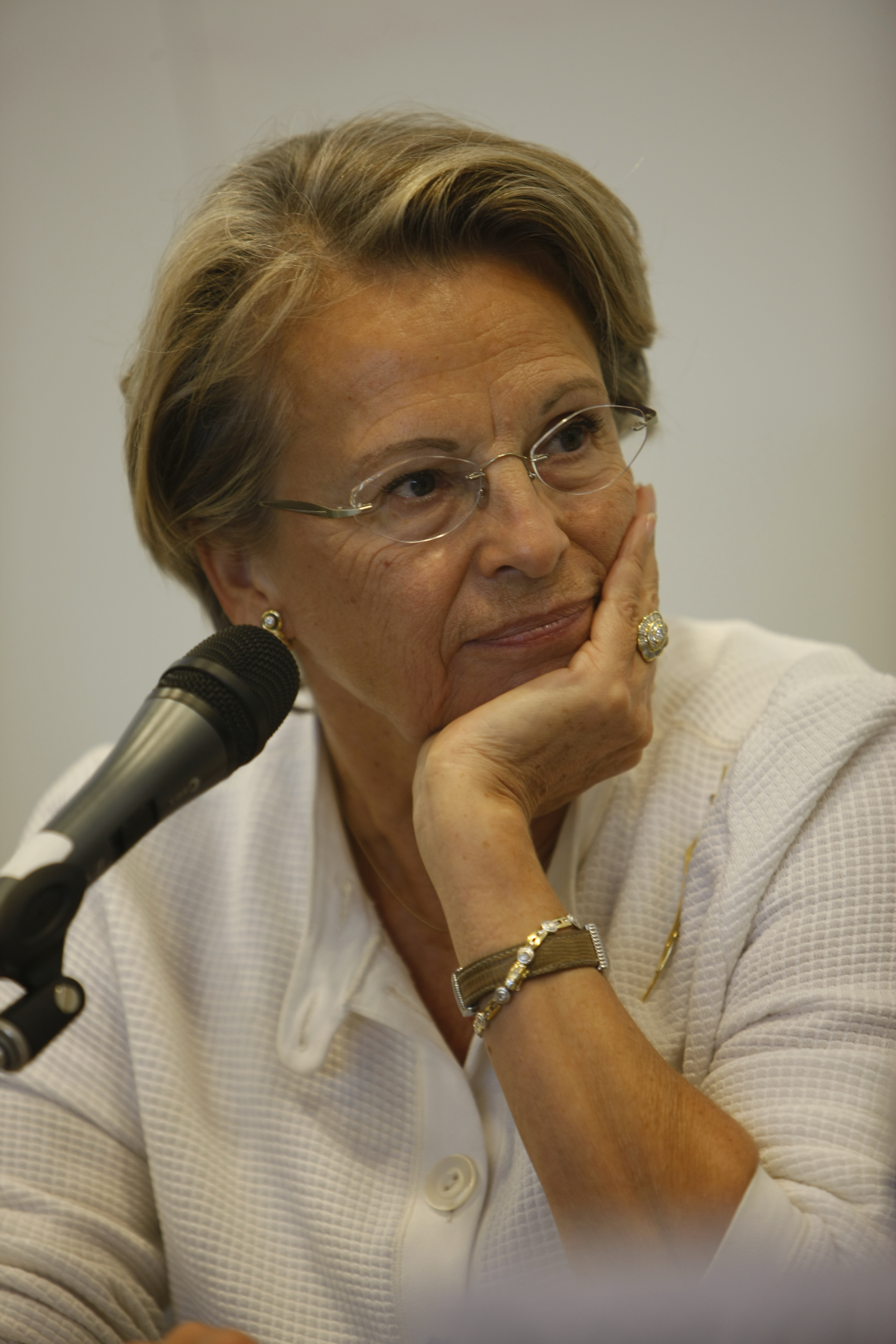 Michèle-Alliot-Marie à l'Université d'été du MEDEF